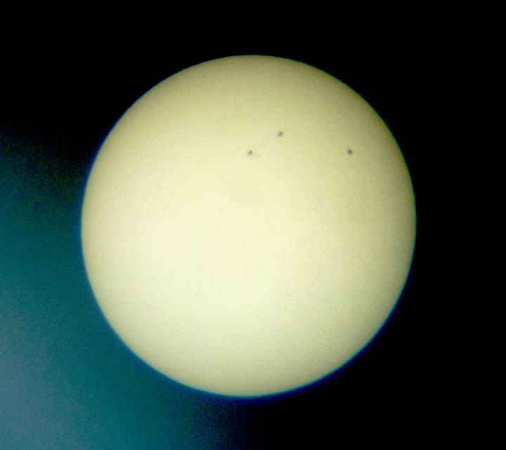 Okularprojektion mit Spektiv 15–45 x 50 mm auf Papier (Zoom auf 45x, Entfernung ca. 30 cm) am 22. Juni 2004, abfotografiert (daher auf dem Kopf stehend). Die "Körnung" stammt vermutlich eher vom Papier als von der Granulation der Photosphäre. Die erkennbare Randverdunklung wird durch die nicht ganz homogene Ausleuchtung überlagert und evtl. überbetont. Beispiel für einfache Sonnenbeobachtung.